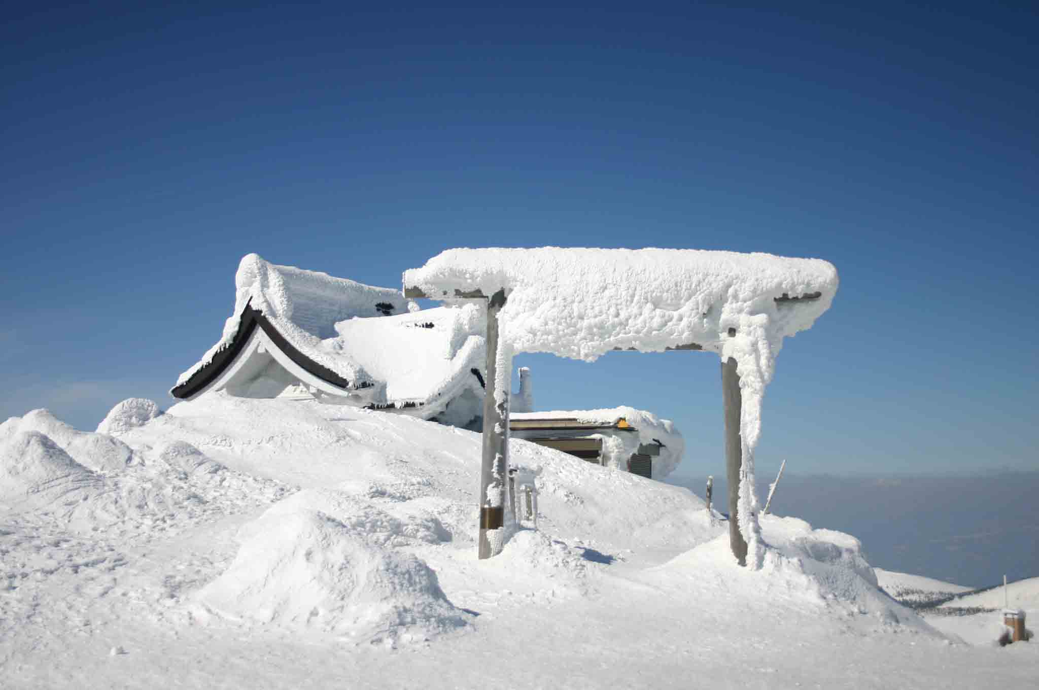 厳冬期の刈田峰神社